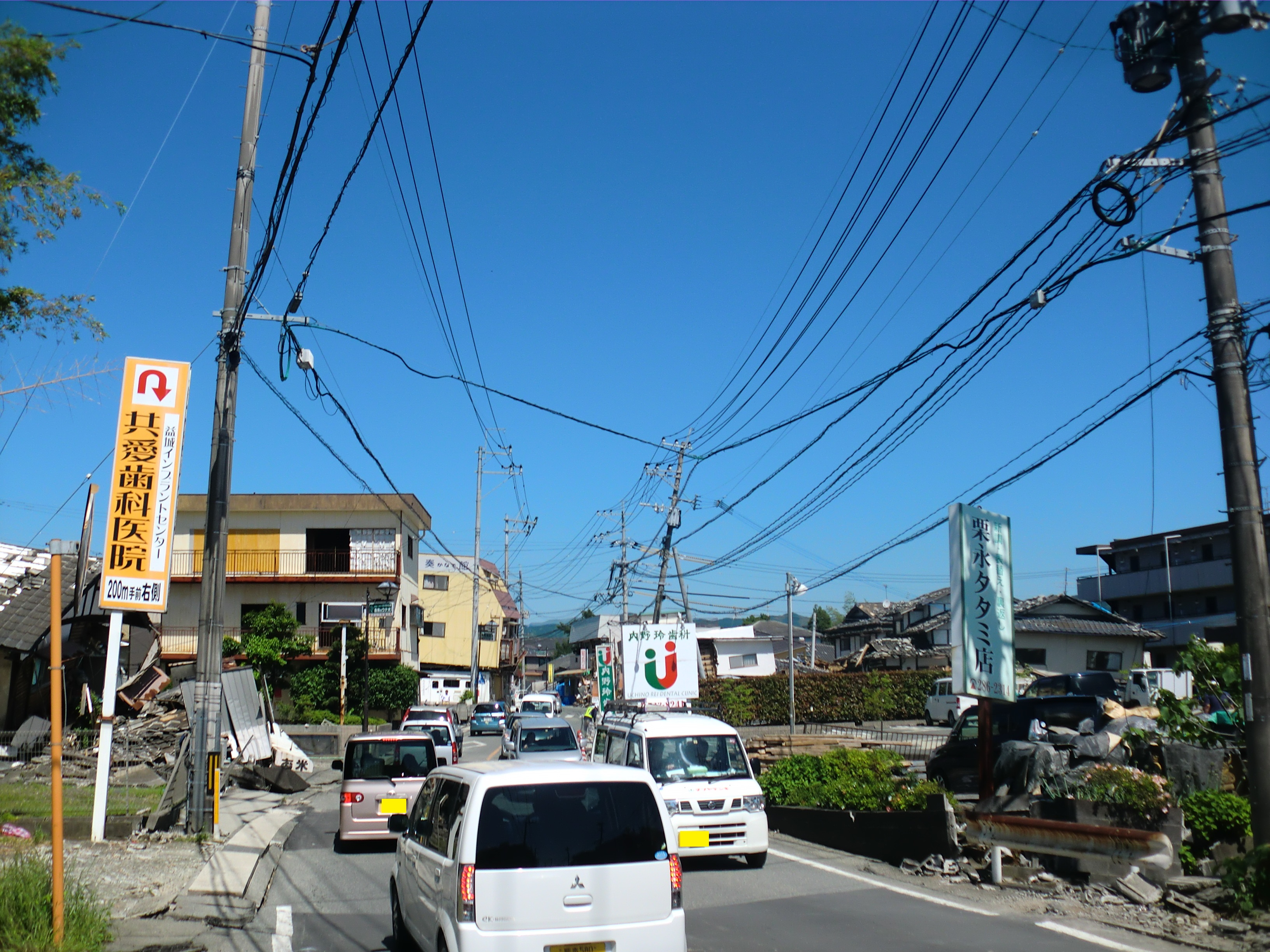 熊本地震で崩壊した上益城郡益城町中心部